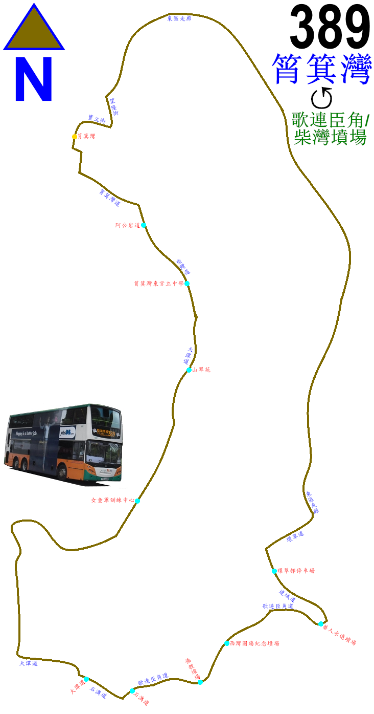 中文（香港）: 新巴389線的走線圖